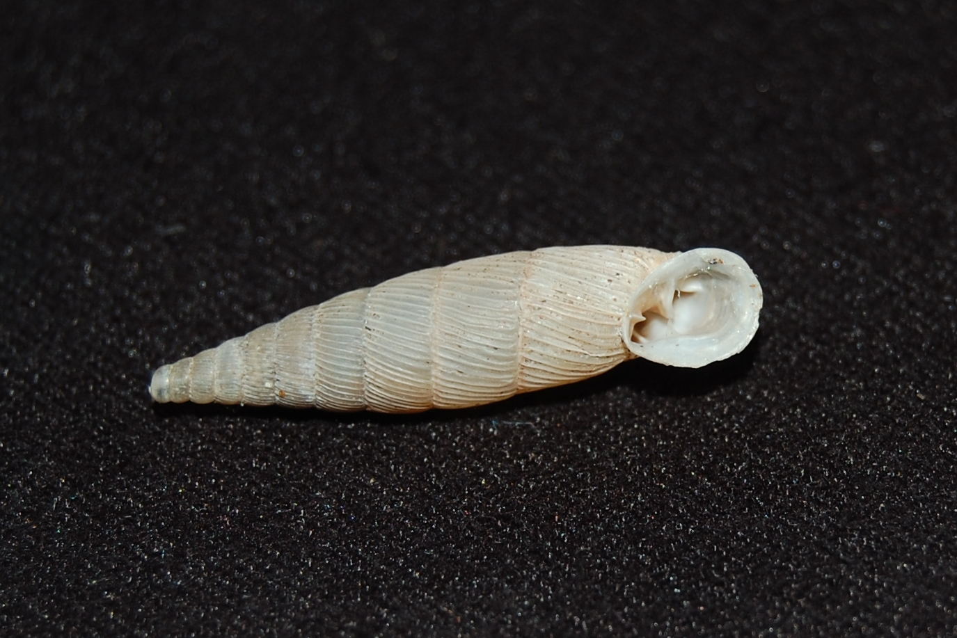 Siciliaria grohmanniana